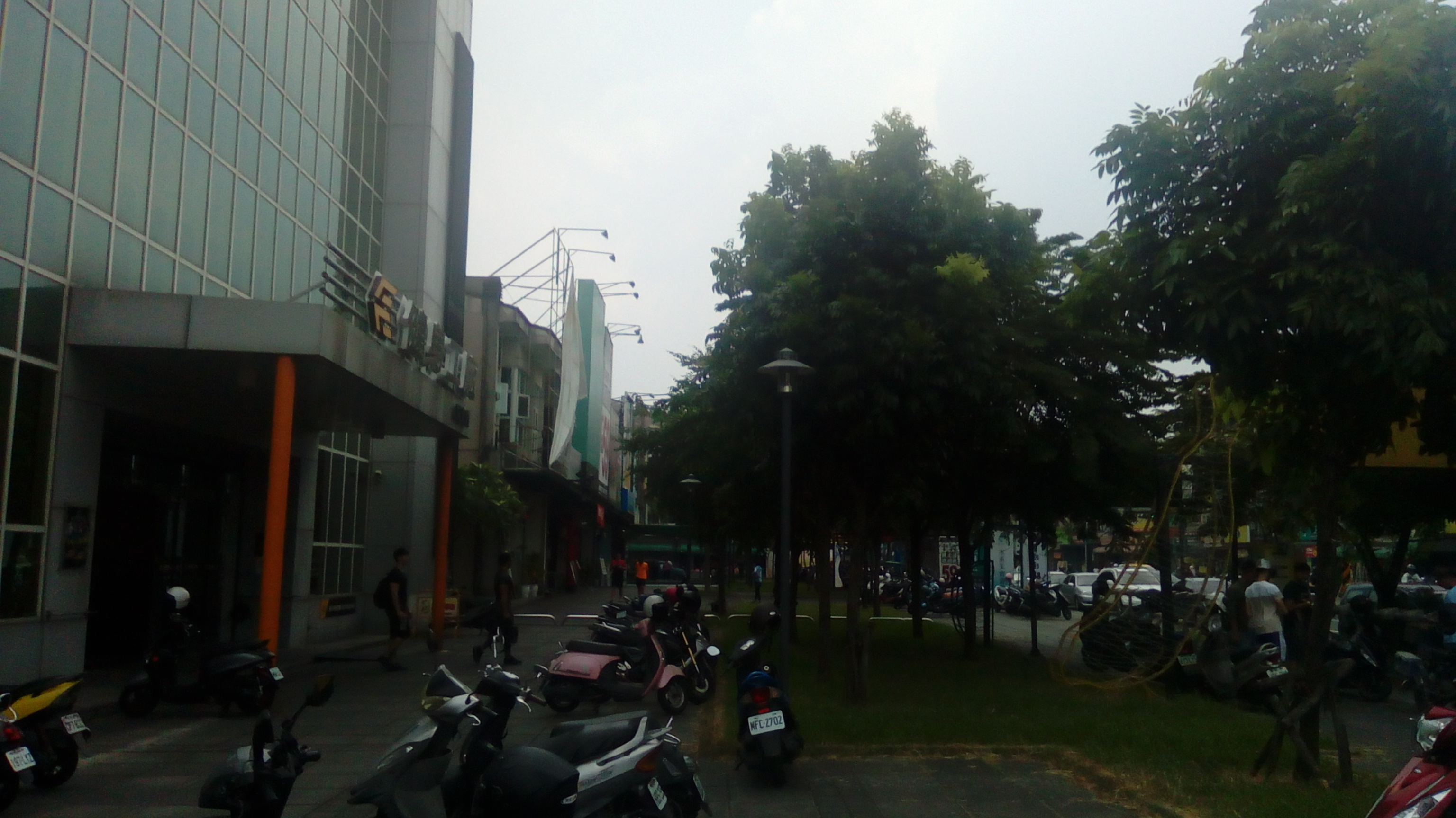 在屏東縣農會及全聯旁